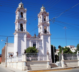 Templo dedicado a San Pedro ubicado entre las calles Corregidora y Sóstenes Castillo en Cocula Jalisco.